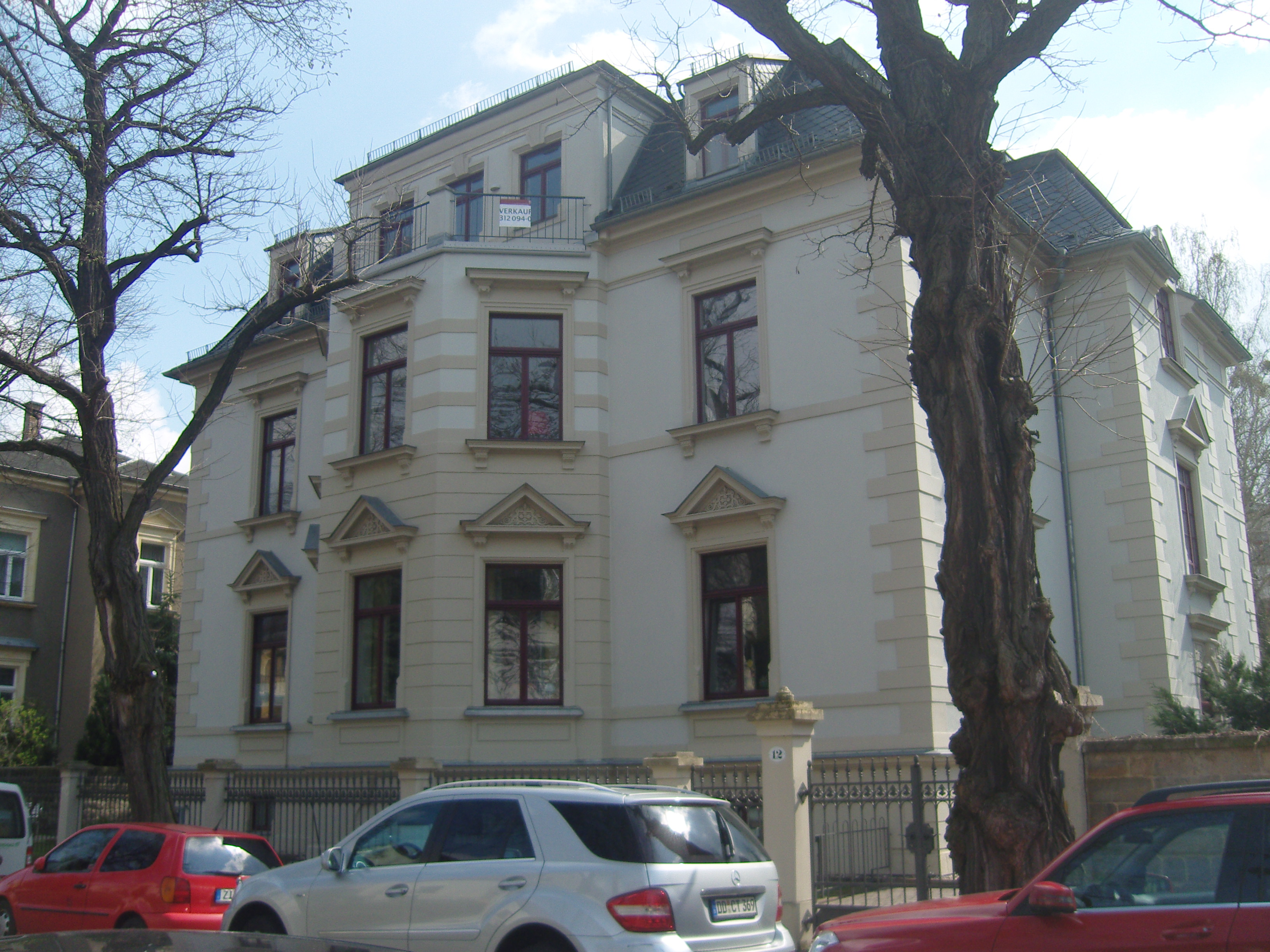 Denkmalgeschütztes Gebäude in der Zittauer Straße 12 in Dresden